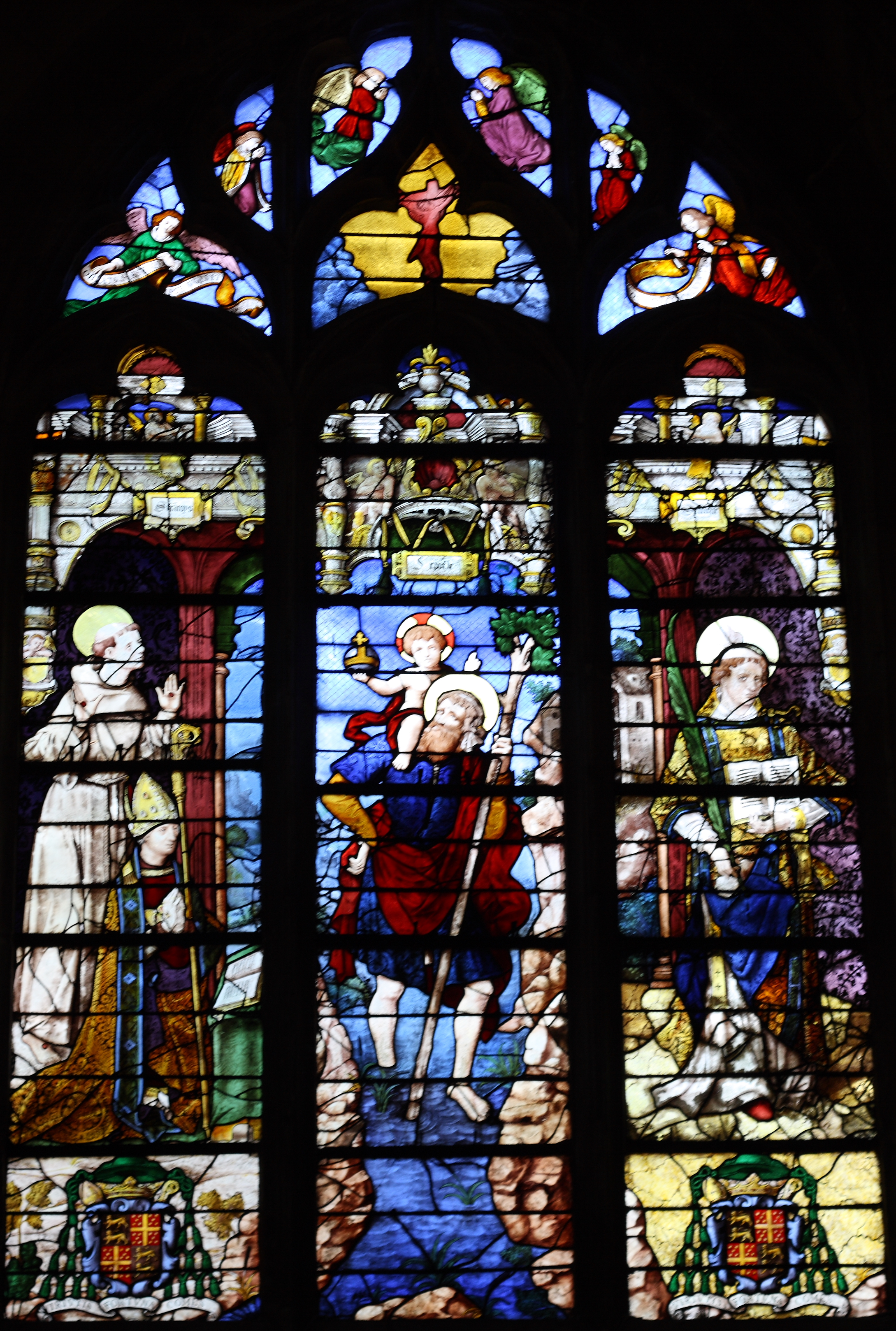 Bleiglasfenster Nr. 9 (16. Jahrhundert) in der katholischen Pfarrkirche Saint-Martin (Collégiale Saint-Martin) in Montmorency, Darstellung: hl. Christophorus, Karton: Gauthier de Campes, Ausführung: Jean Chastelain (siehe: Dominique Foussard, Charles Huet, Mathieu Lours: Églises du Val-d'Oise. Pays de France, Vallée de Montmorency, Société d'Histoire et d'Archéologie de Gonesse et du Pays de France, 2. Auflage, Gonesse 2011, ISBN 9782953155426)